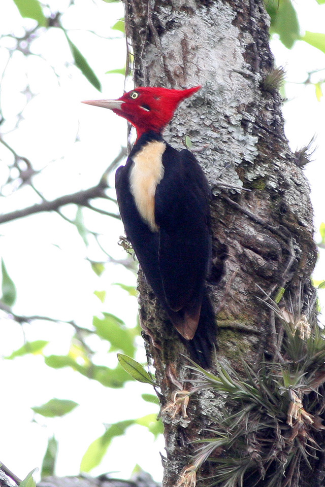 Cachi to Salta, Salta